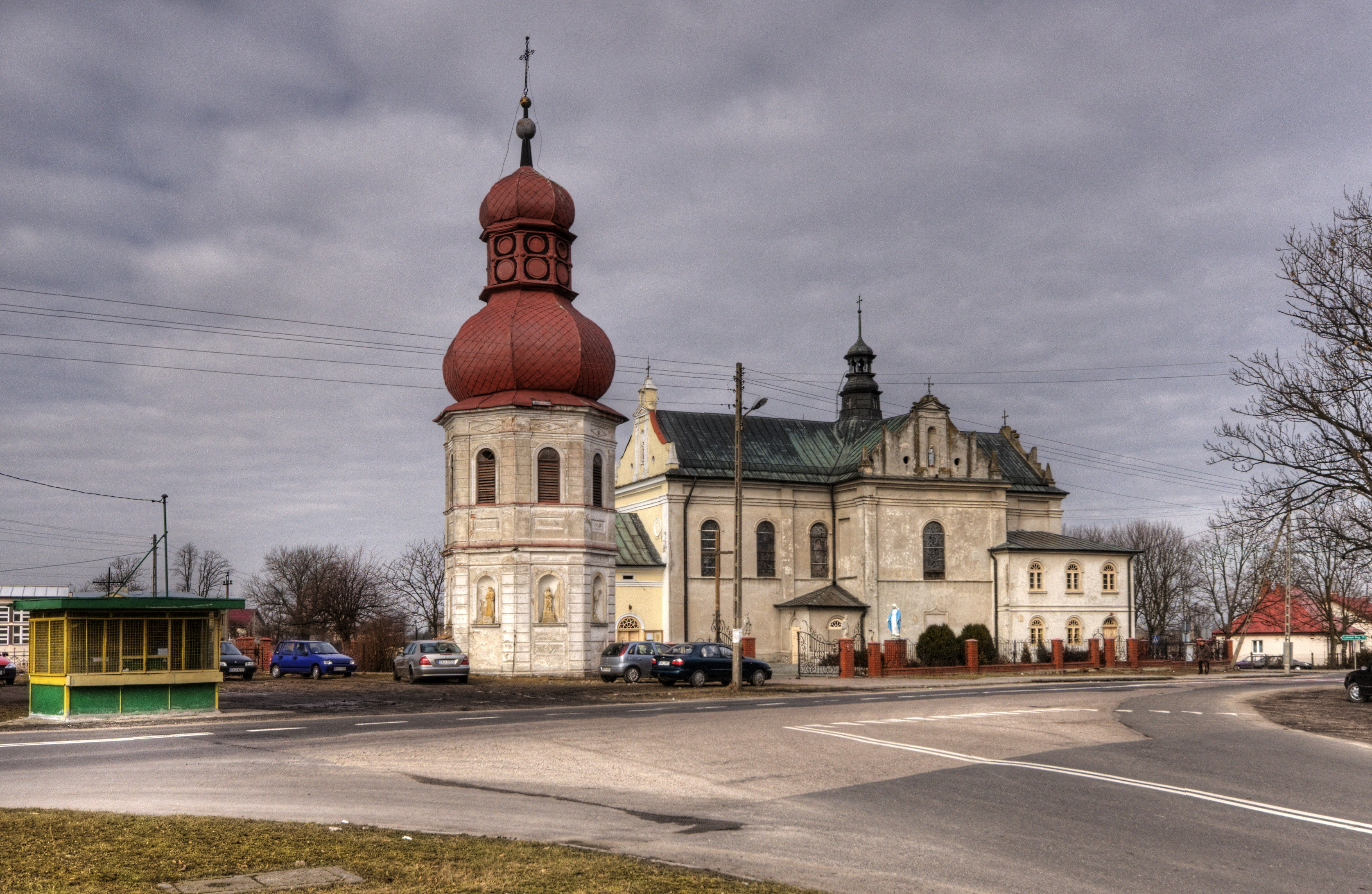 Łanięta - widok na kościół i dzwonnicę 09.1978.